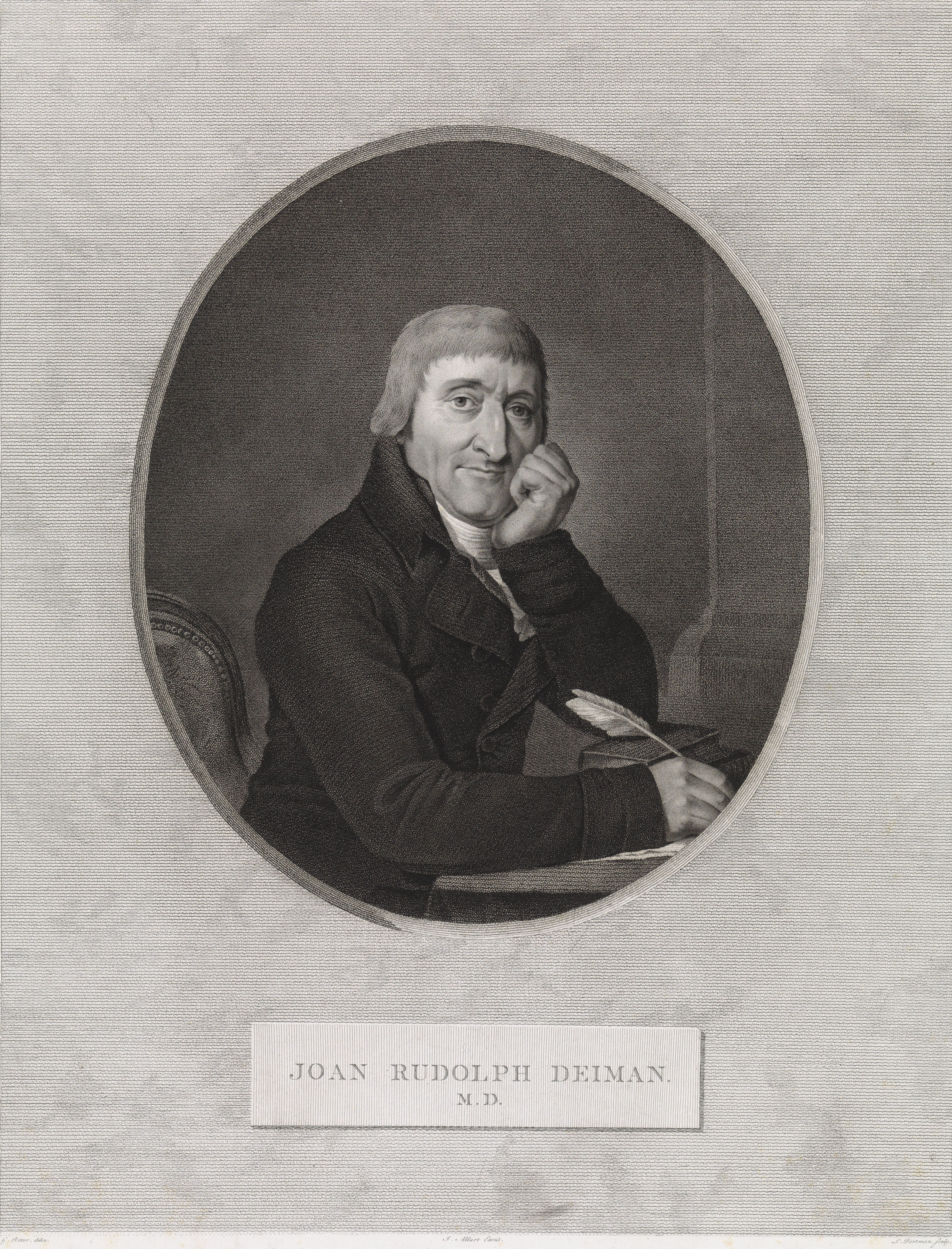 Kupferstich Portrait um 1810